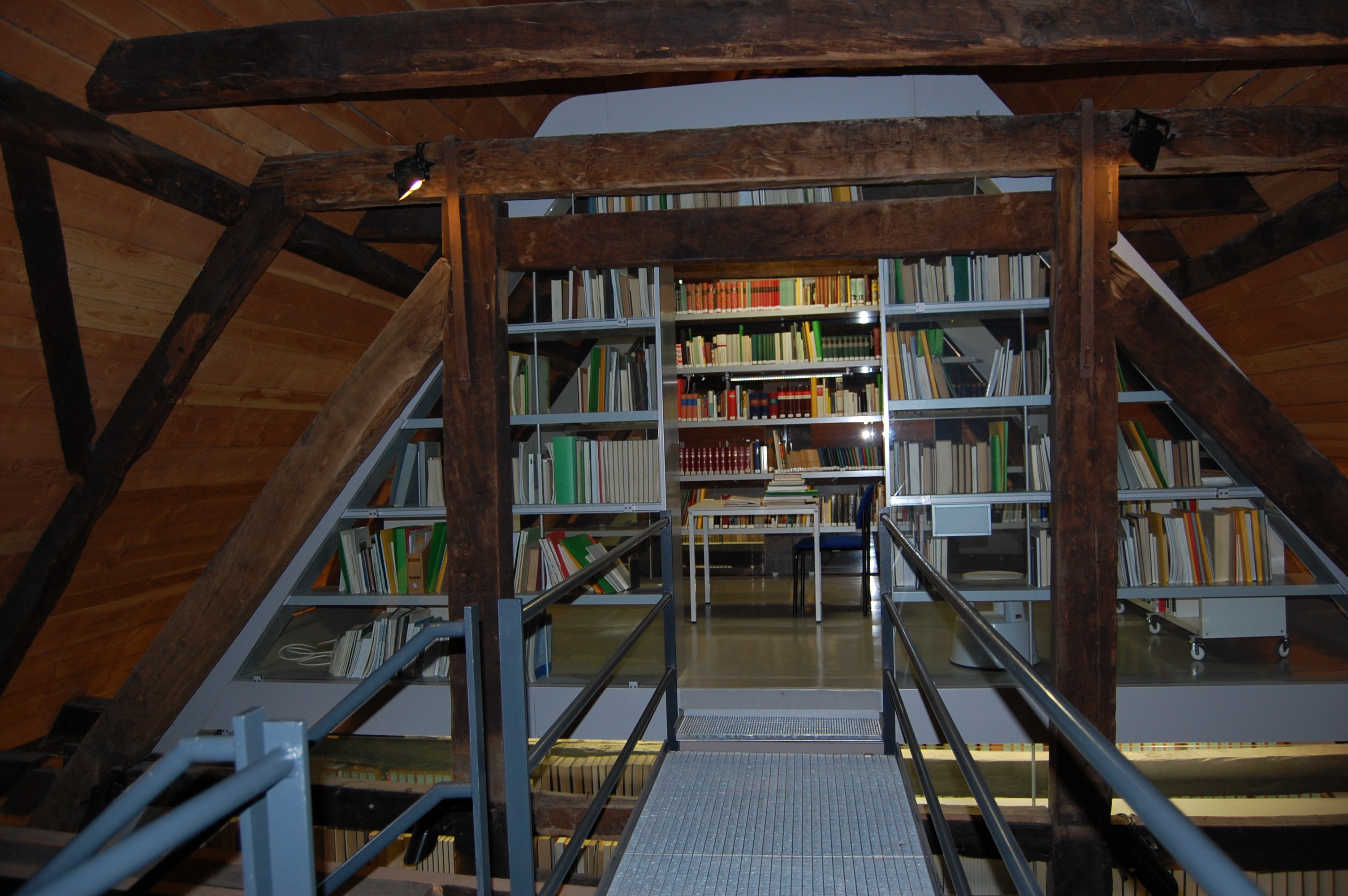 "Spitzbogen" Stadtarchiv Arnsberg